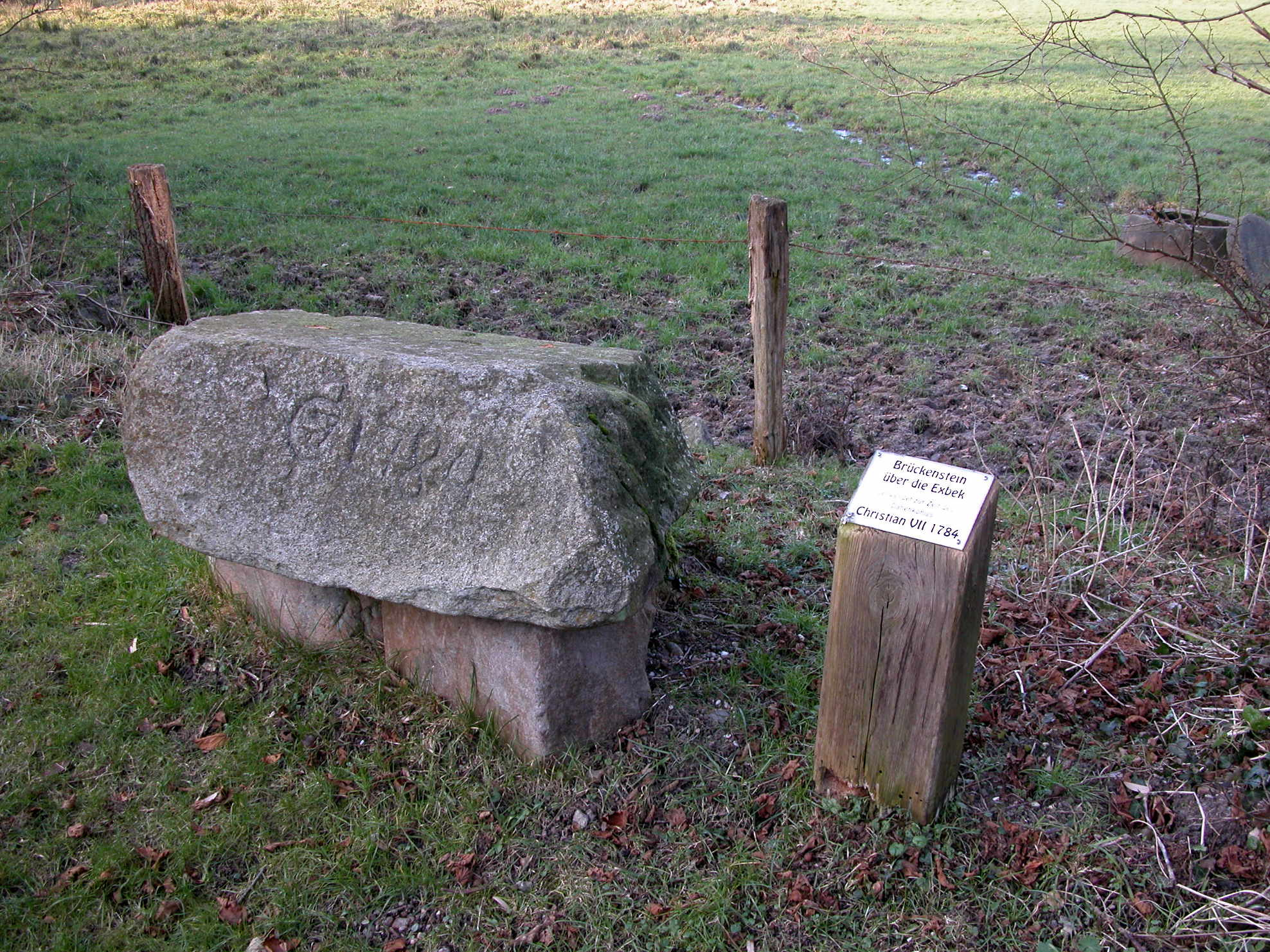 Brückenstein Exbek Borgstedt